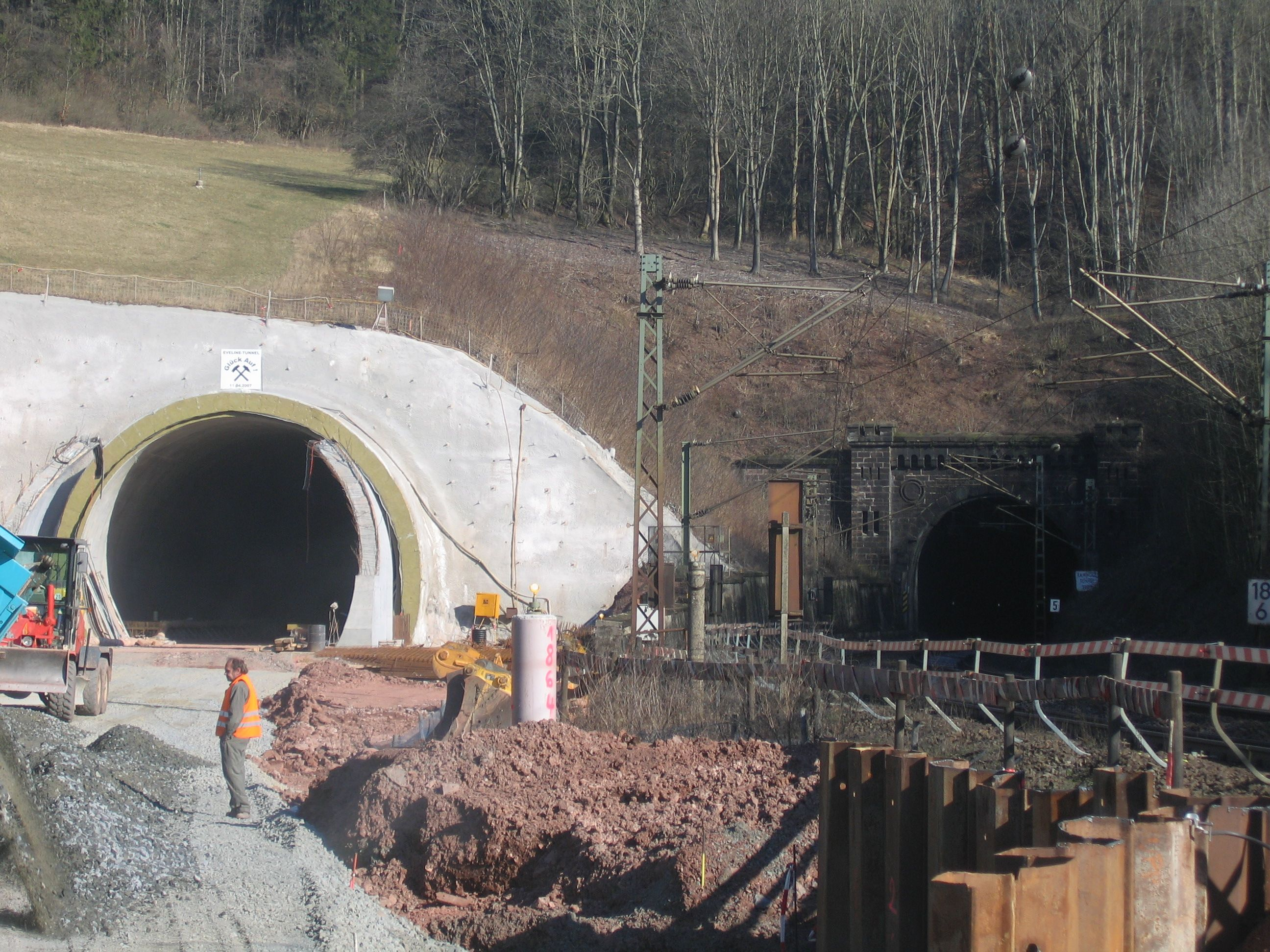 Altes und neues Südportal Ramholztunnel